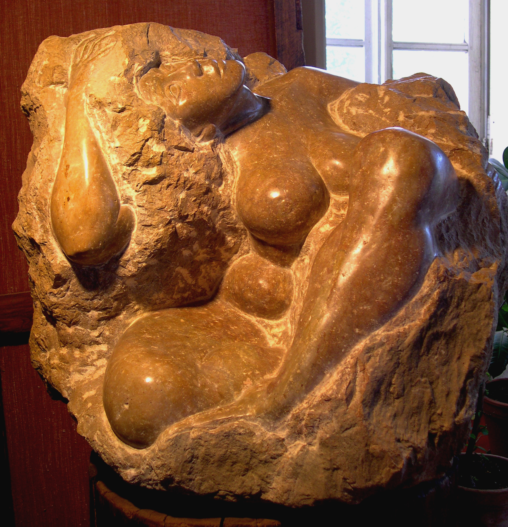 Gaia, sculpture en taille directe de Marcel Mayer.